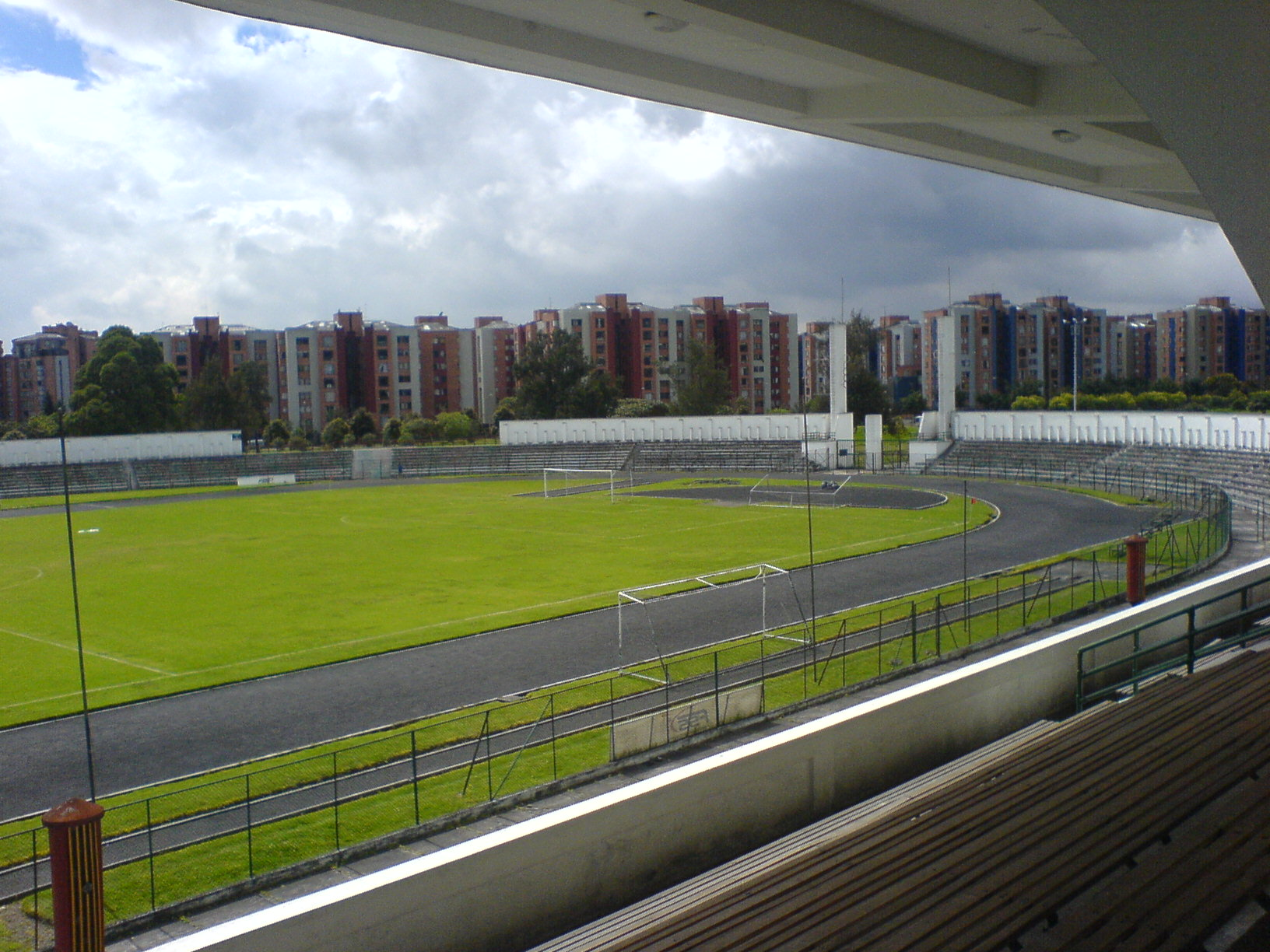 Estadio Alfonso Lopéz Pumarejo